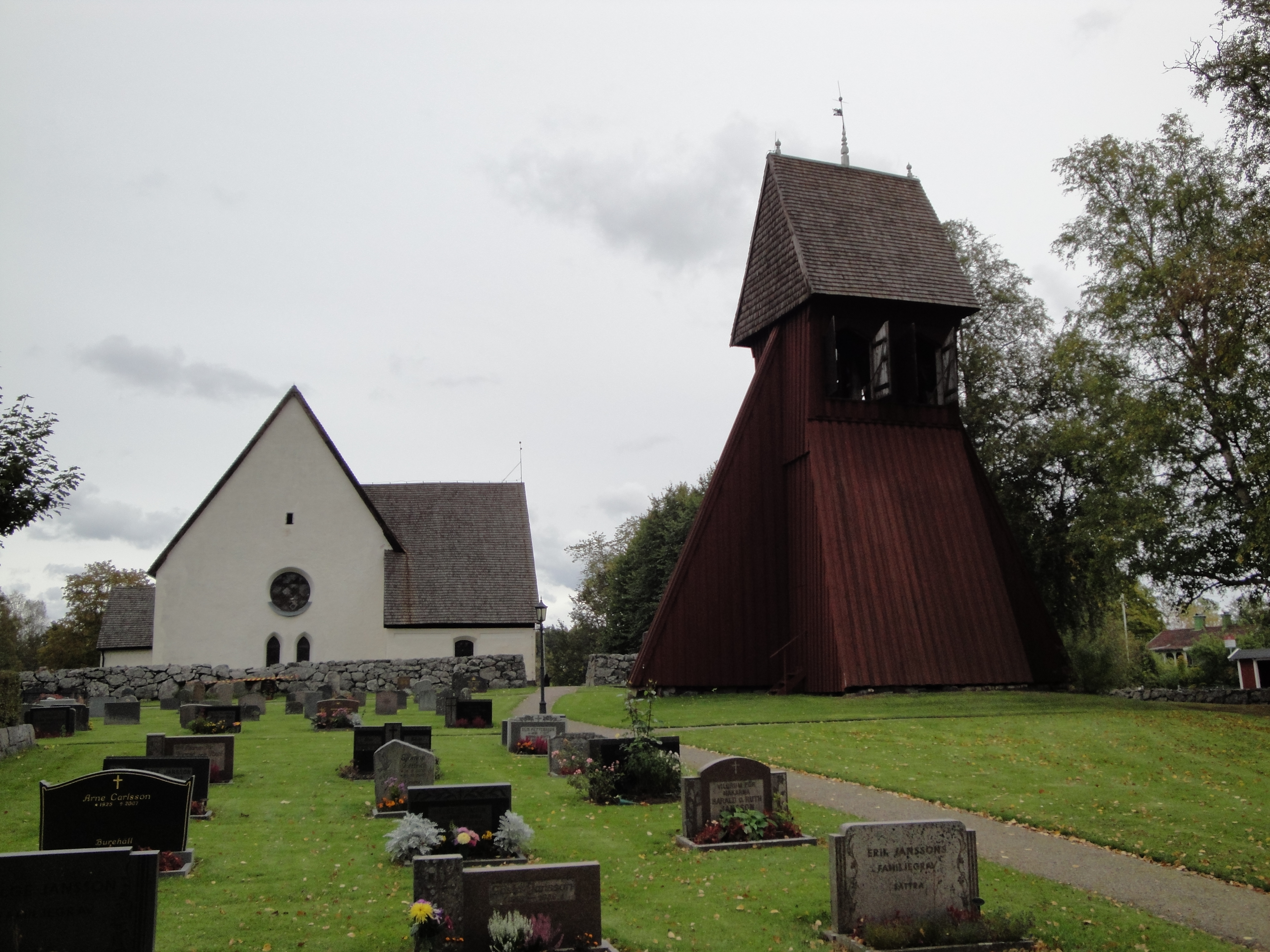 Riala kyrka i Norrtälje kommun.